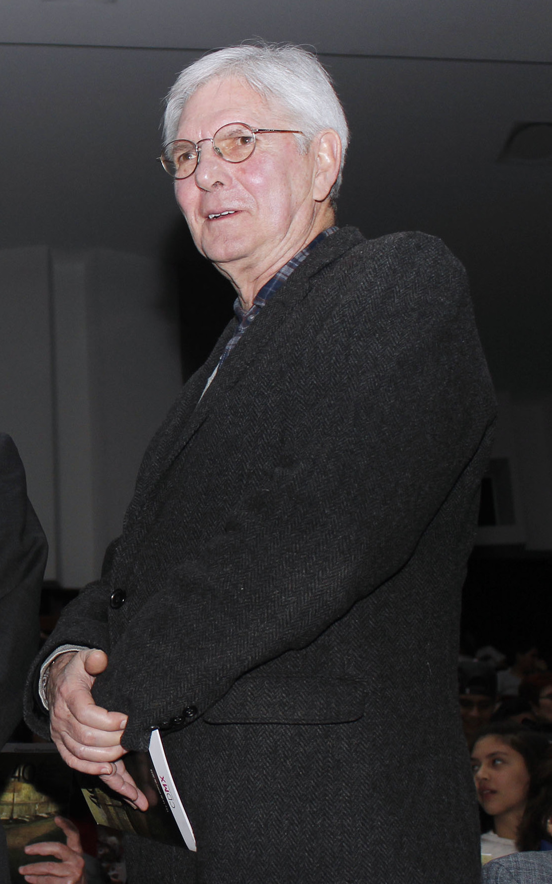 Sábado 13 de enero de 2018 En la Sala Silvestre Revueltas del Centro Cultural Ollin Yoliztli, la Orquesta Filarmónica de la Ciudad de México ofreció su Concierto Inaugural de la Temporada 2018 con un programa formado por obras de Wagner, CVhaikovski y Mozart, bajo la dirección del invitado David Reiland. Al acto asistió el Secretario de Cultura de la Ciudad de México, Eduardo Vázquez Martín, y el Embajador de Bélgica en México, Antoine Evrard. Fotografía: Maritza Ríos / Secretaría de Cultura CDMX